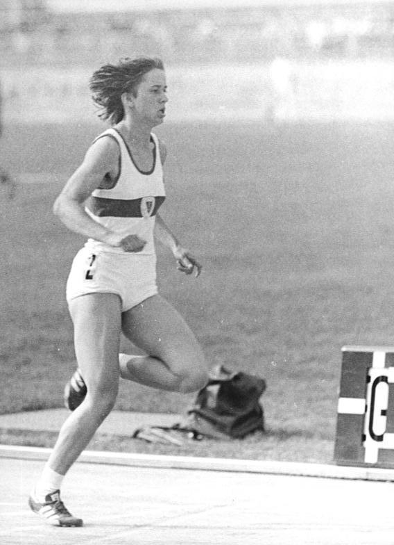 Marlies Oelsner ADN-ZB Häßler 1-7-77 Dresden: DDR-Leichtathletik-Meisterschaften - 2.Tag Mit 10,88 s lief die 19jährige Marlies Oelsner (SC Motor Jena) im Finale des 100-m-Laufes einen neuen Weltrekord und blieb damit als erste Frau unter 11 s. [Marlies Oelsner (verheiratete Marlies Göhr)] Abgebildete Personen: Göhr, Marlies: Leichtathletin, DDR